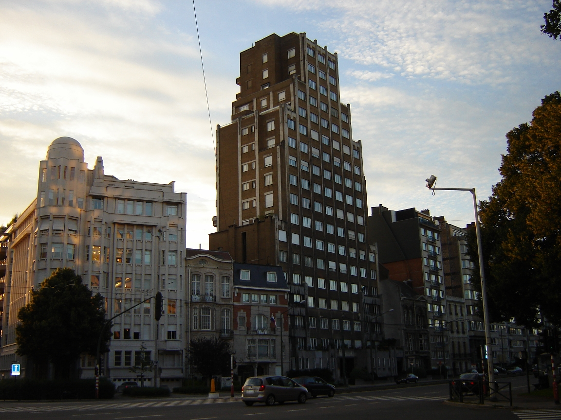 Résidence de la Cambre, a historic high-rise in Brussels